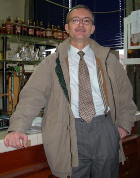 Gianni Fochi